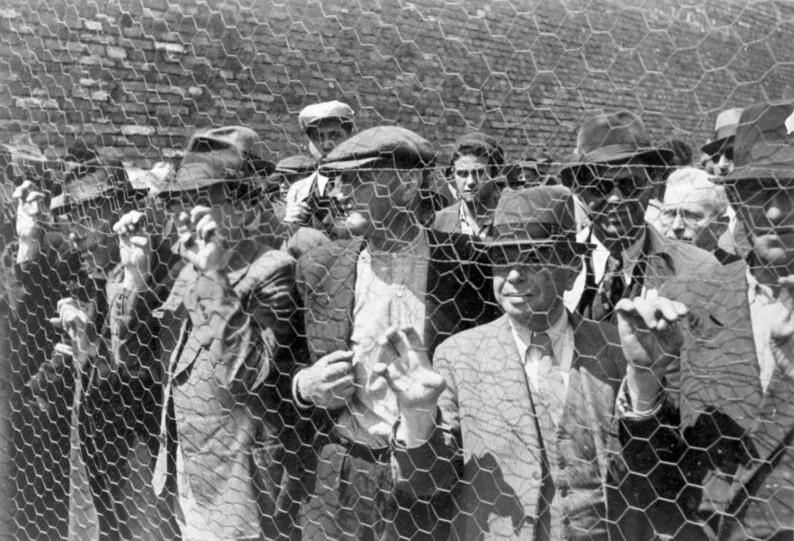 Scherl Bildtext unter Bild 183-L29091: Krieg auf dem Balkan: Belgrad. Die Juden in Belgrad werden für Aufräumungsarbeiten erfasst. PK-Aufnahme: Kriegsberichter: Neubauer 4683-41 "Fr." "Fr. OKW" April 41